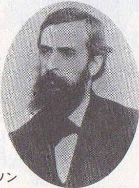 アメリカ人宣教のデイヴィッド・トムソン